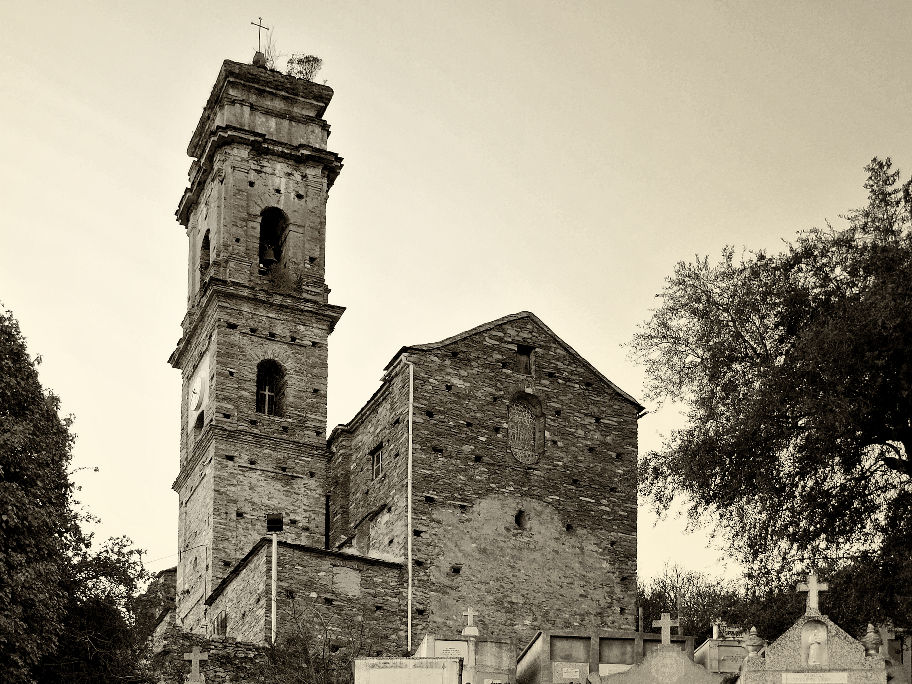 Volpajola, Costera (Corse) - Église de l'Annonciation (Annunziata)